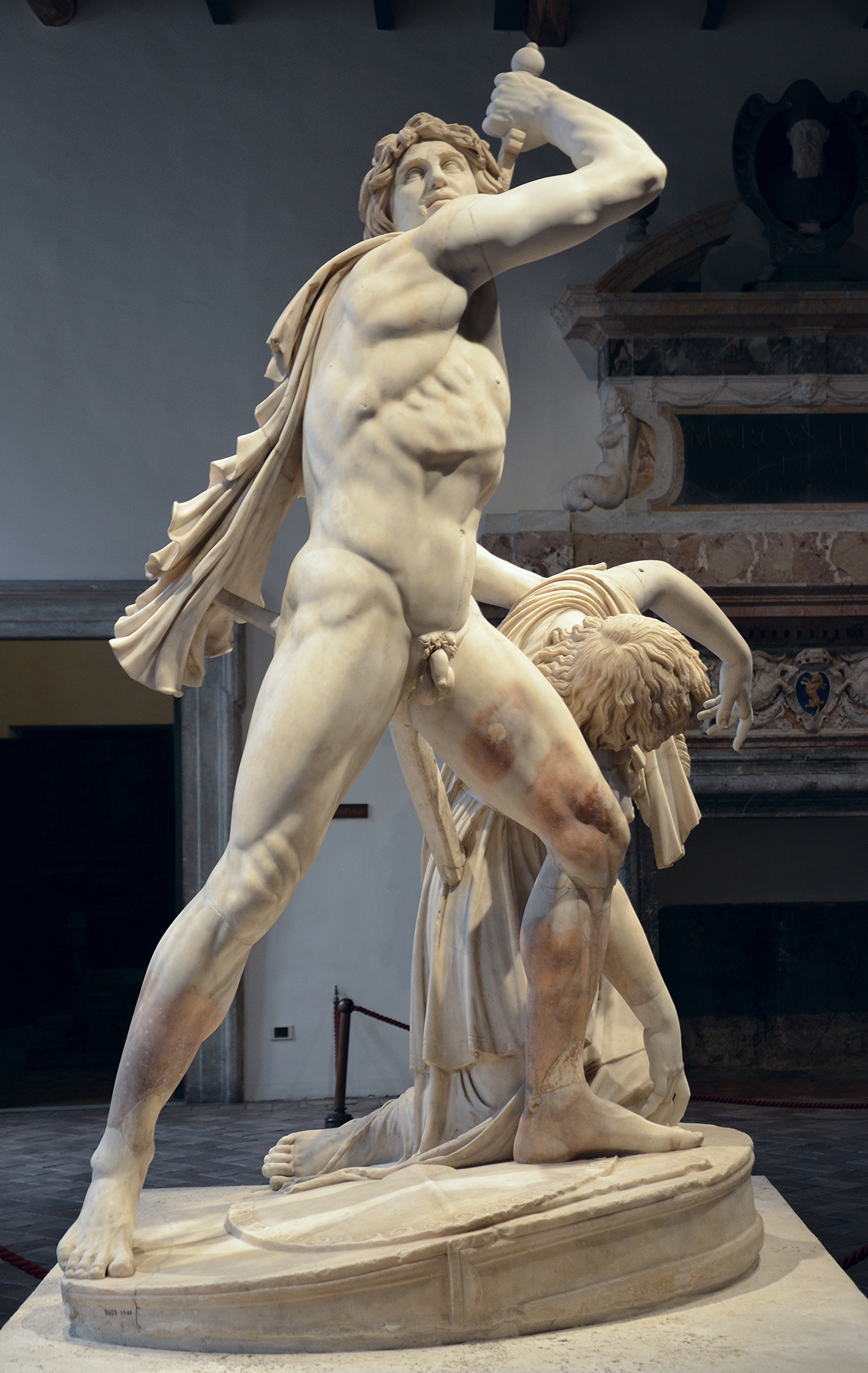 Palazzo Altemps, Rome